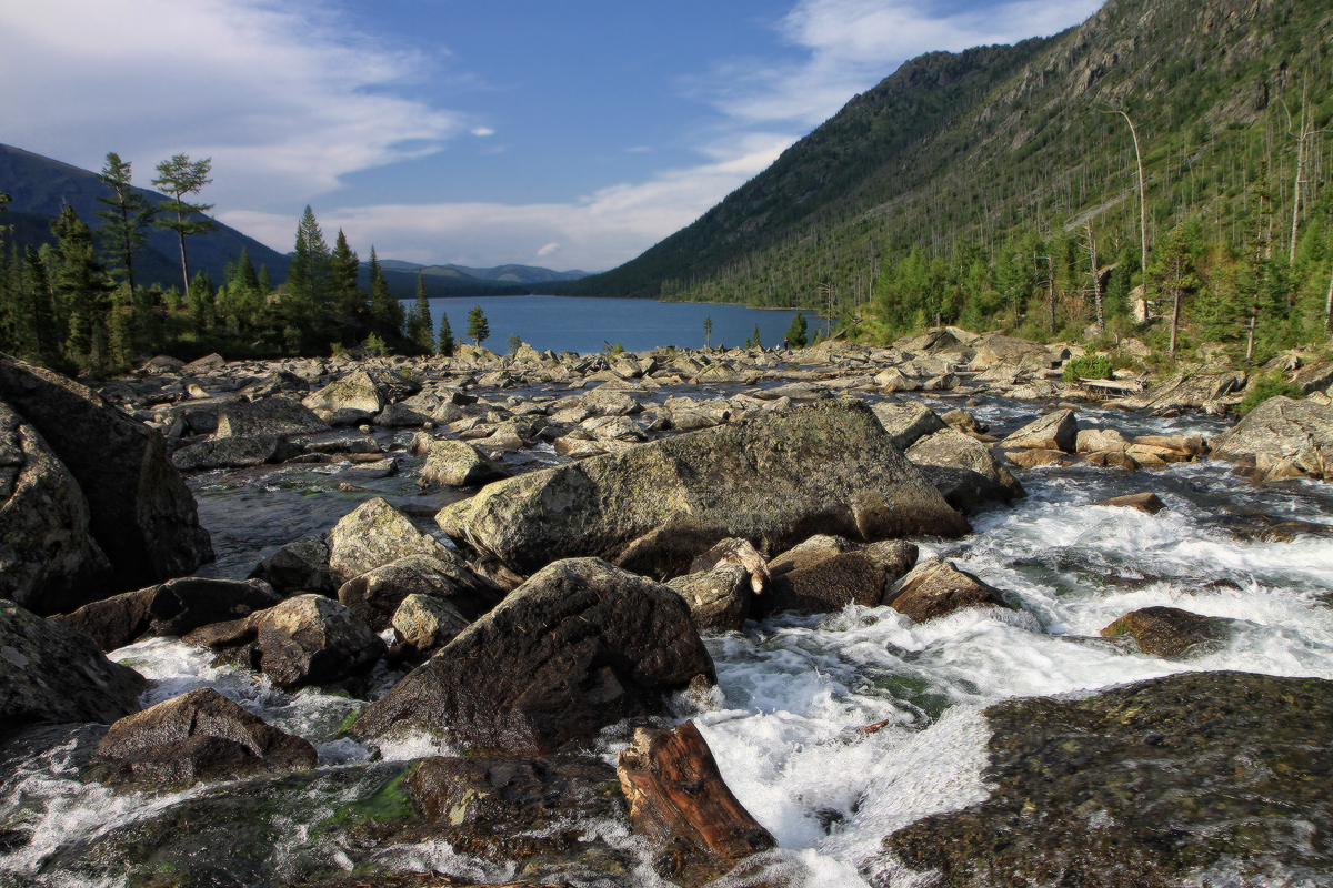 Мультинские озера: Северо-западный фланг Катунского хребта, в 7-10 км к северо-западу от высоты 3145., Мульта, Усть-Коксинский район, Алтай This image is related to the protected area of Russia number 0410044